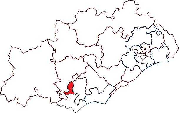 Situation du canton dans le département de l'Hérault